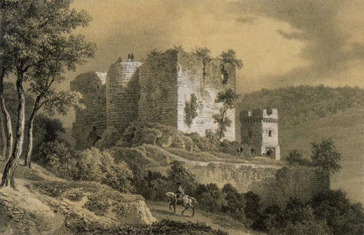 Lithografie der Burgruine Hugstein bei Guebwillerr im Elsass